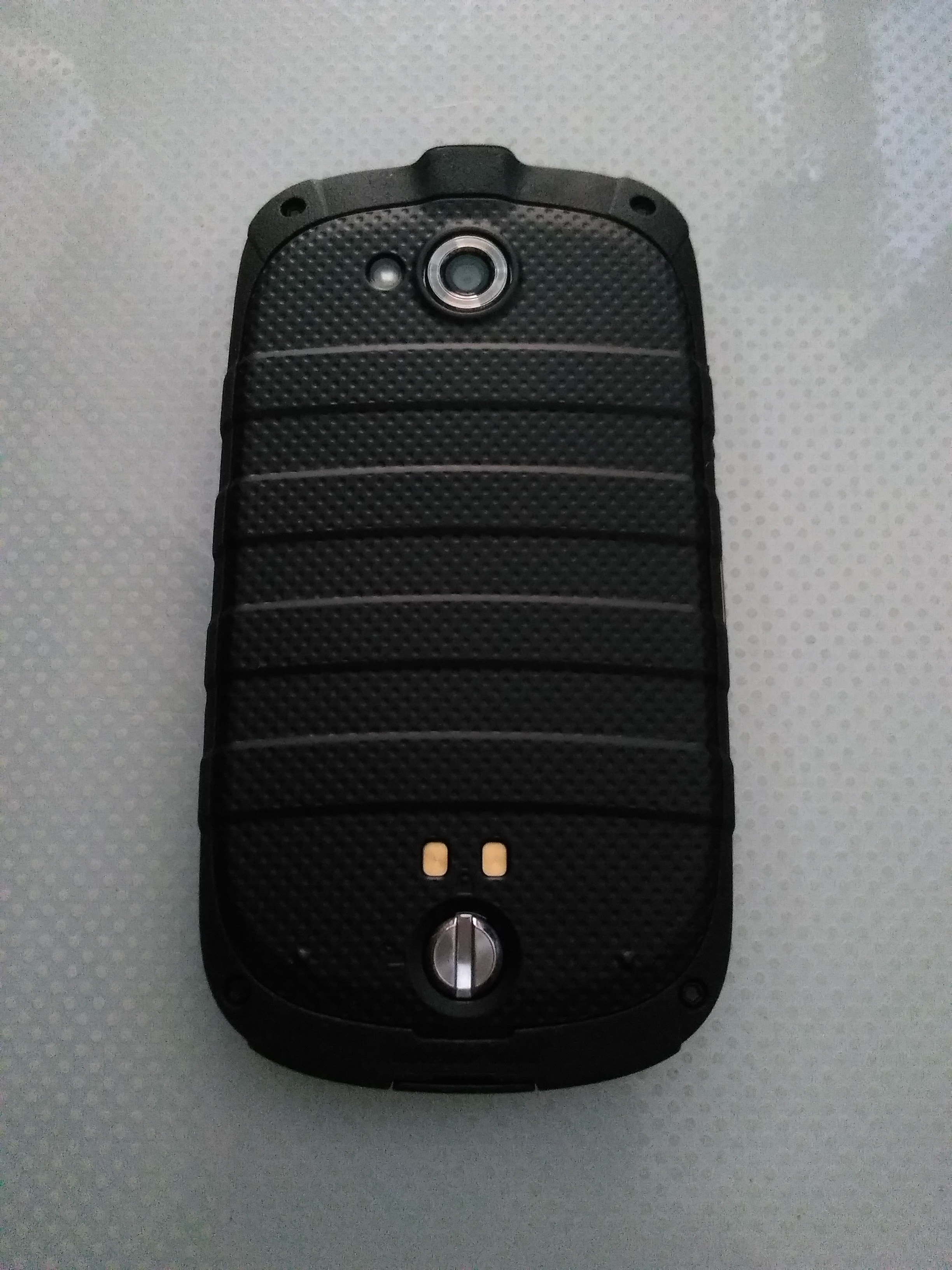 TORQUE SKT01の背面